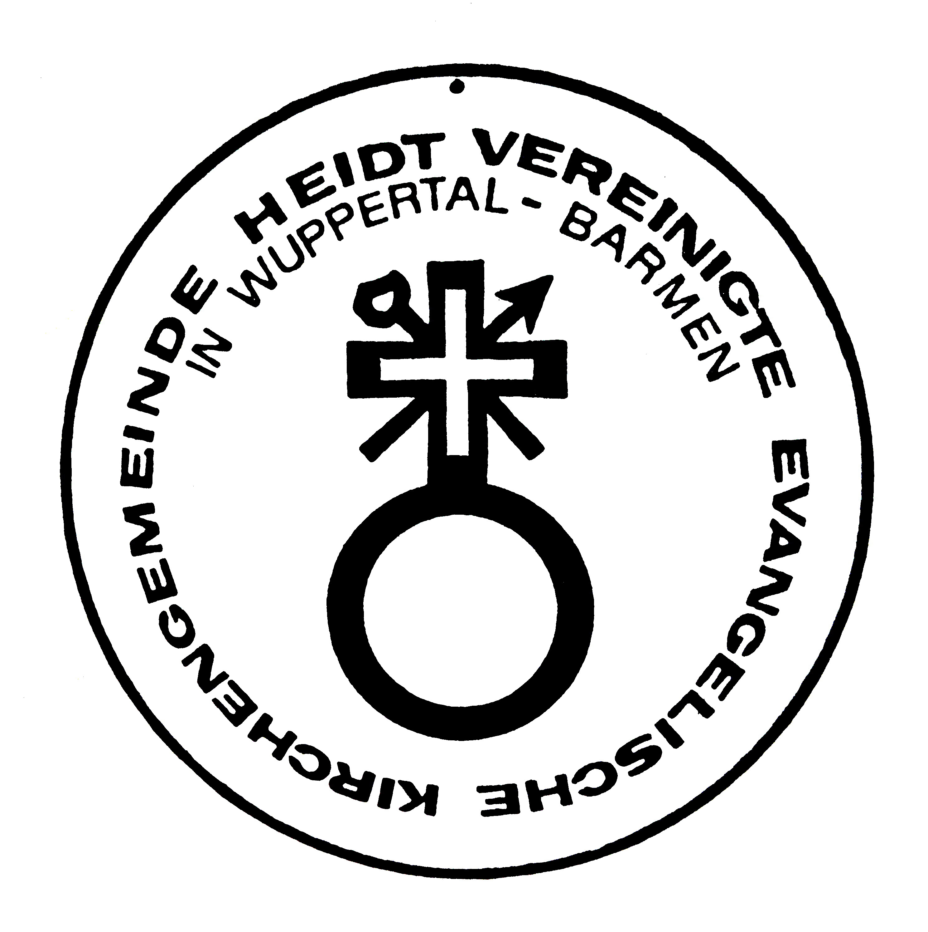 Siegel der Kirchengemeinde Heidt in Wuppertal,in Gebrauch bis 2008